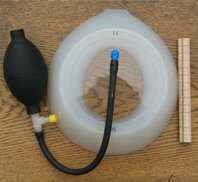 Saugglocke nach Eckart Klobe